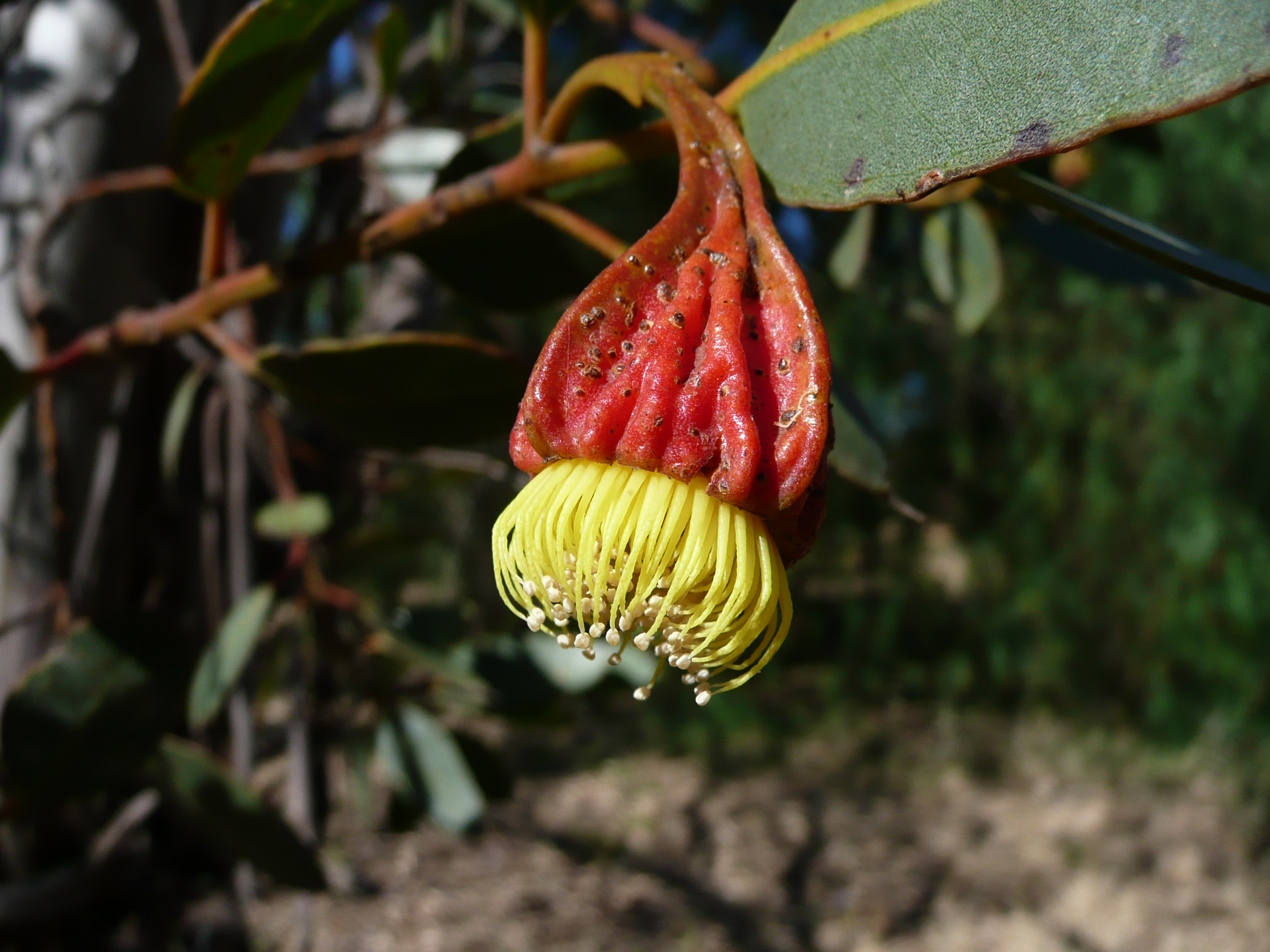 Eucalyptus stoatei. Blossom